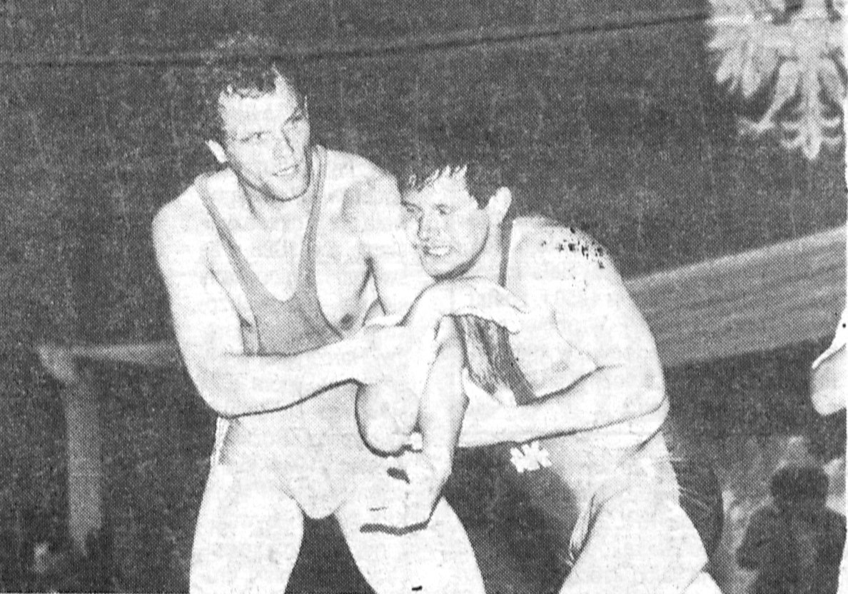 Andrzej Wroński(po lewej) i Bronisław Dąbrowski, polscy zapaśnicy podczas walki